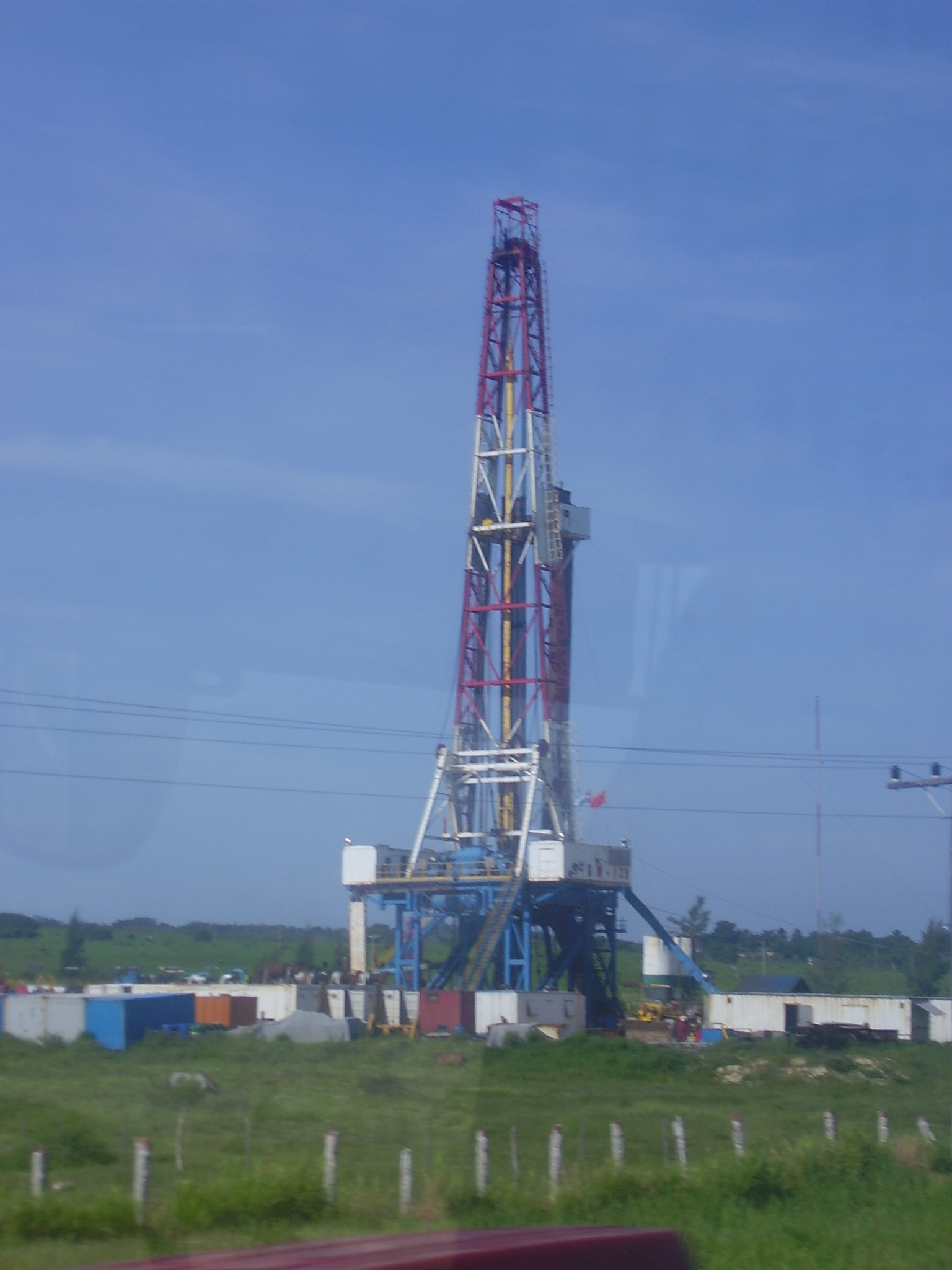 ein Bohrturmrturm nahe Havanna